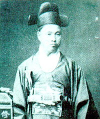 (한국어) 김홍집(金弘集)